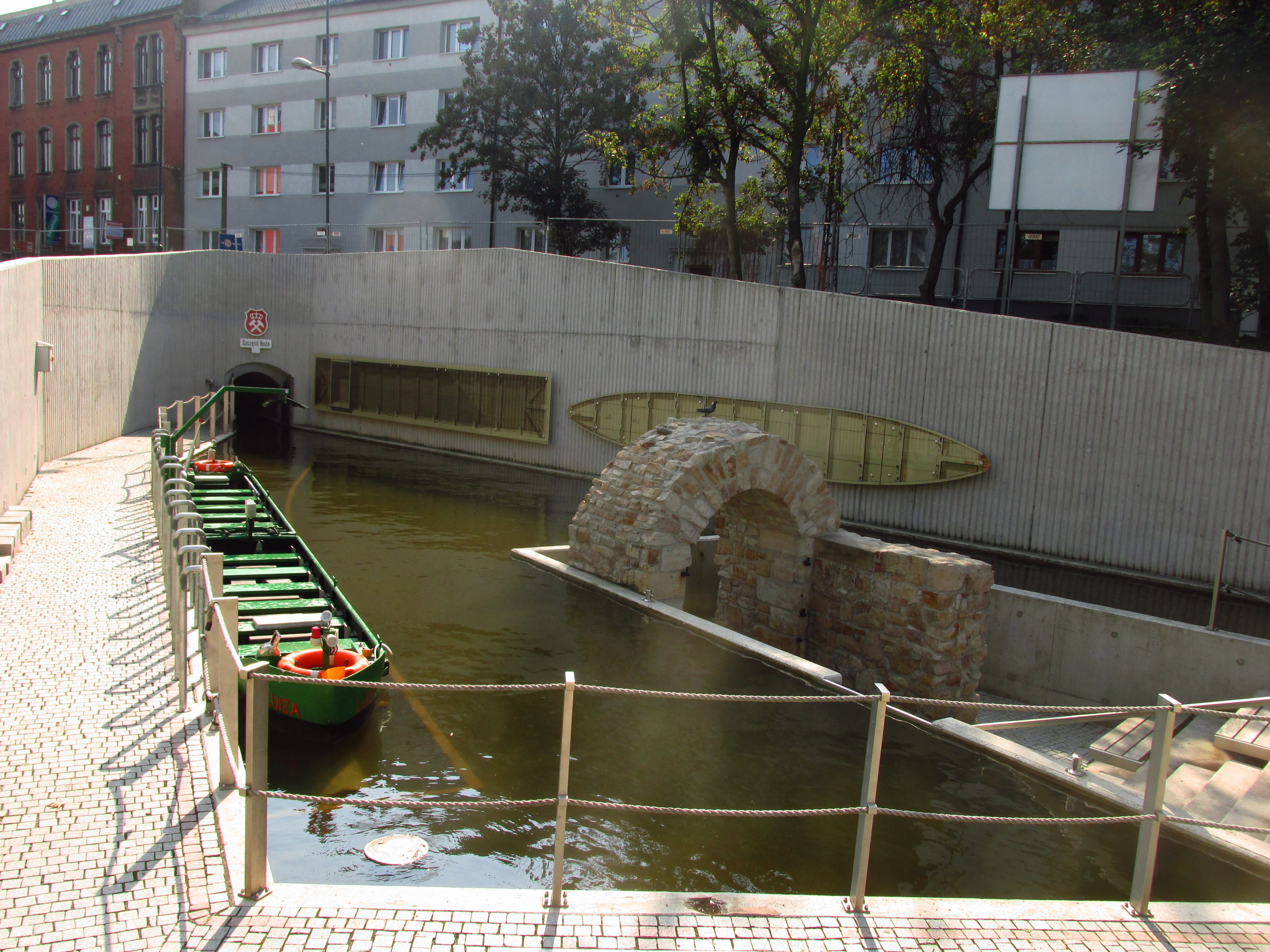 Zabrze, Główna Kluczowa Sztolnia Dziedziczna - ujście sztolni w centrum Zabrza i port